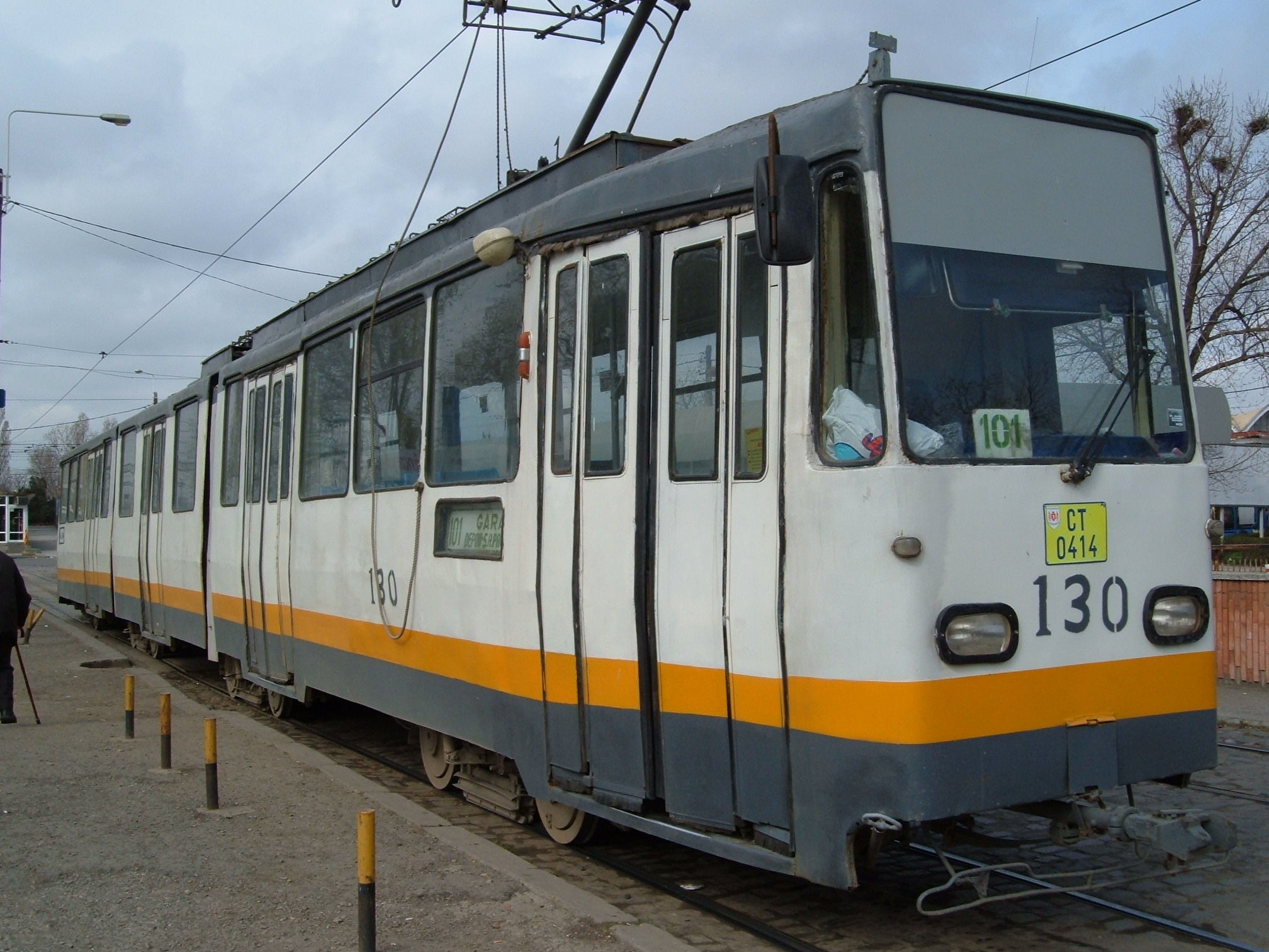 Tramvai V2A pe fosta linie de tramvai Constănțean 101,la Gară